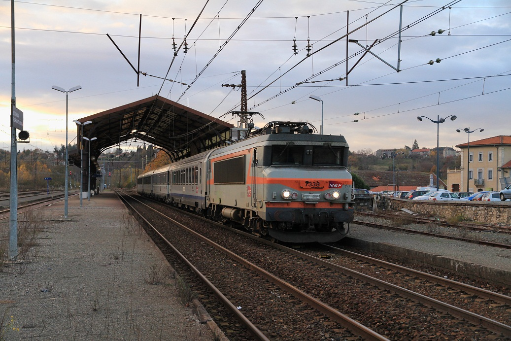 La BB 7338 en gare de Montréjeau - Gourdan-Polignan assurant un train en direction de Toulouse-Matabiau en novembre 2010, Midi-Pyrénées, France.